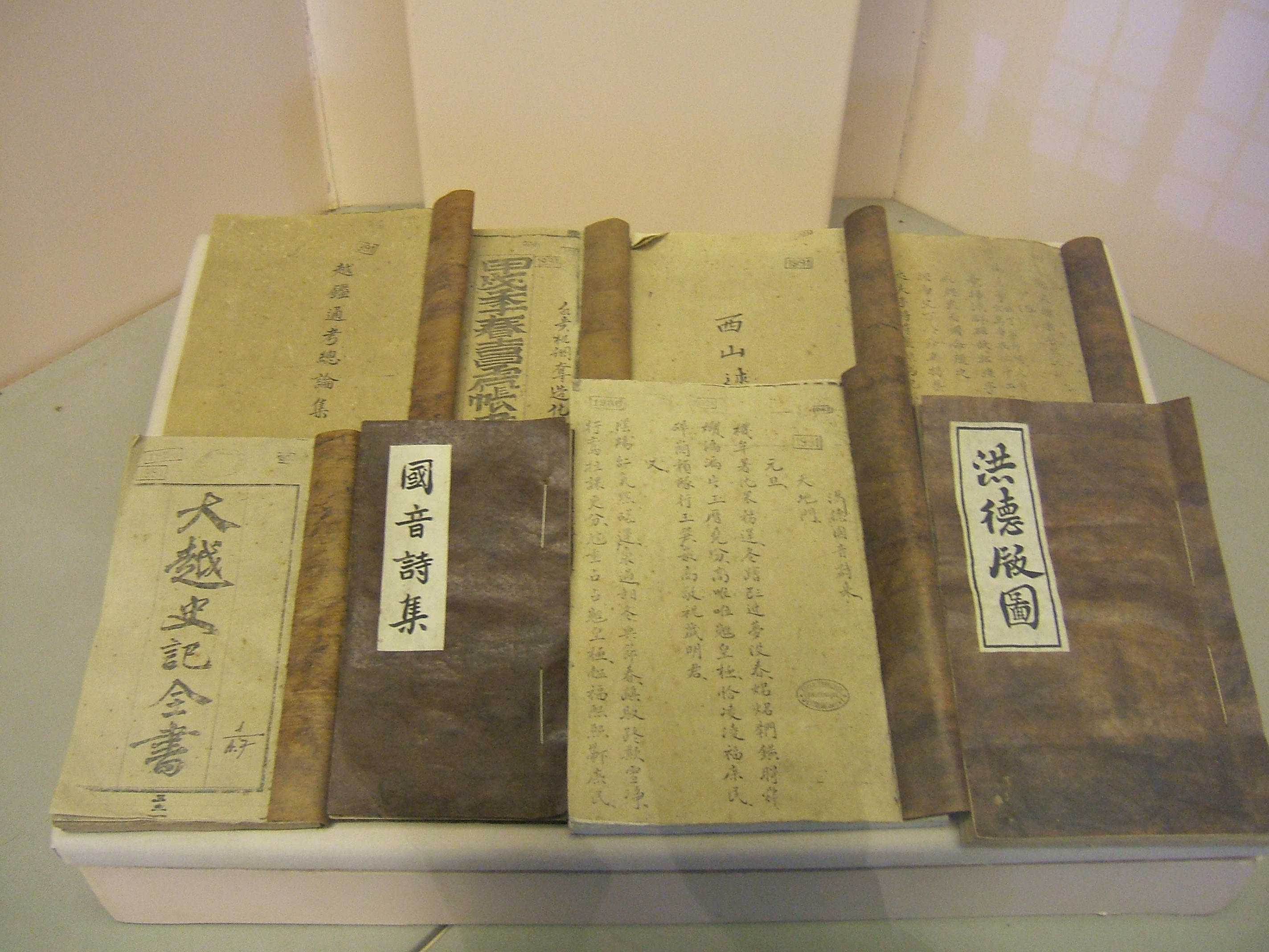 Một số tác phẩm văn học trung đại Việt Nam. Ba tác phẩm có dòng Hán tự rõ nhất bên dưới, từ trái sang phải gồm: Đại Việt sử ký toàn thư, Quốc âm thi tập và Hồng Đức bản đồ (bản đồ Hồng Đức).